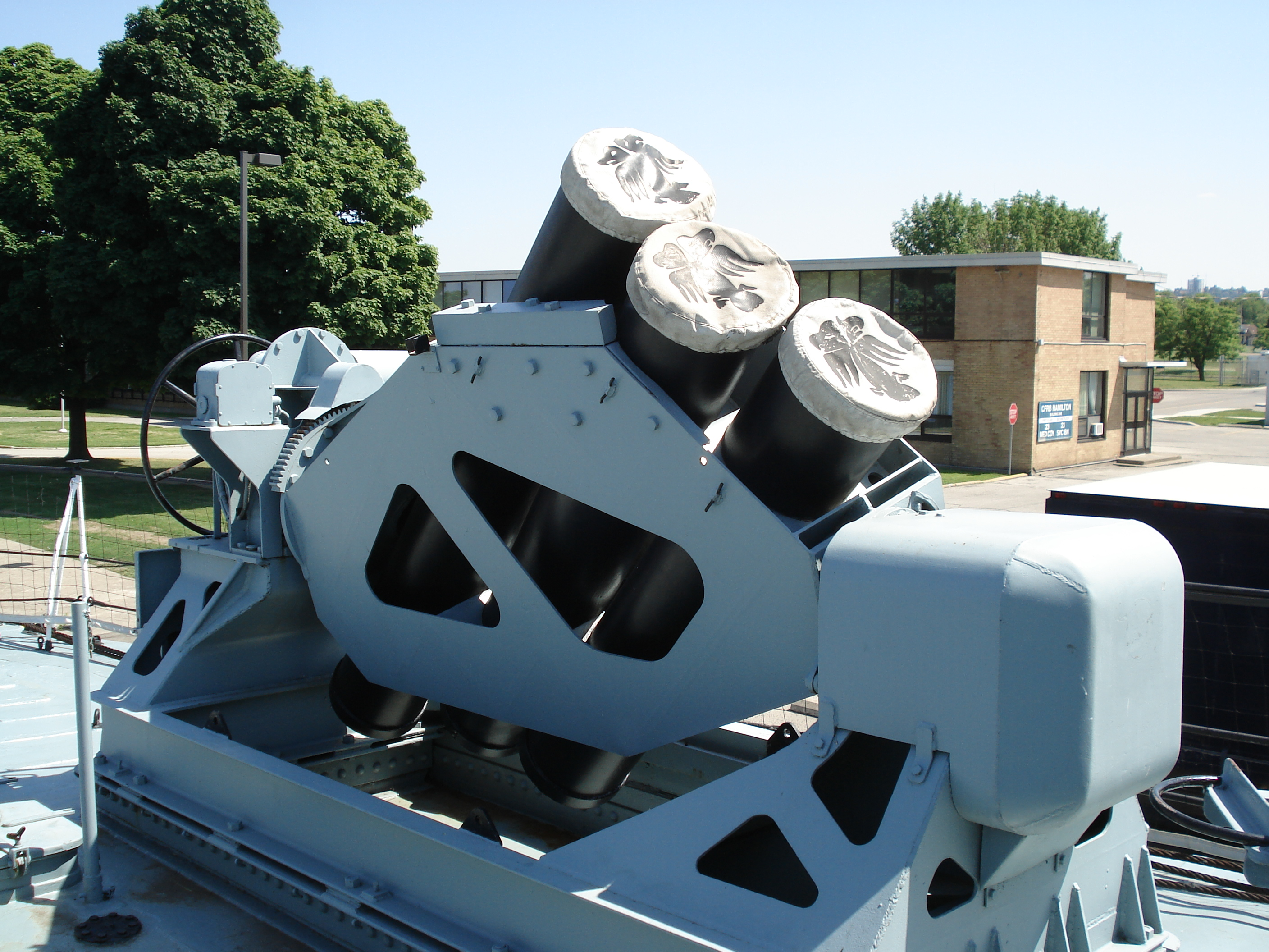 Squid anti-submarine mortar on HMCS Haida